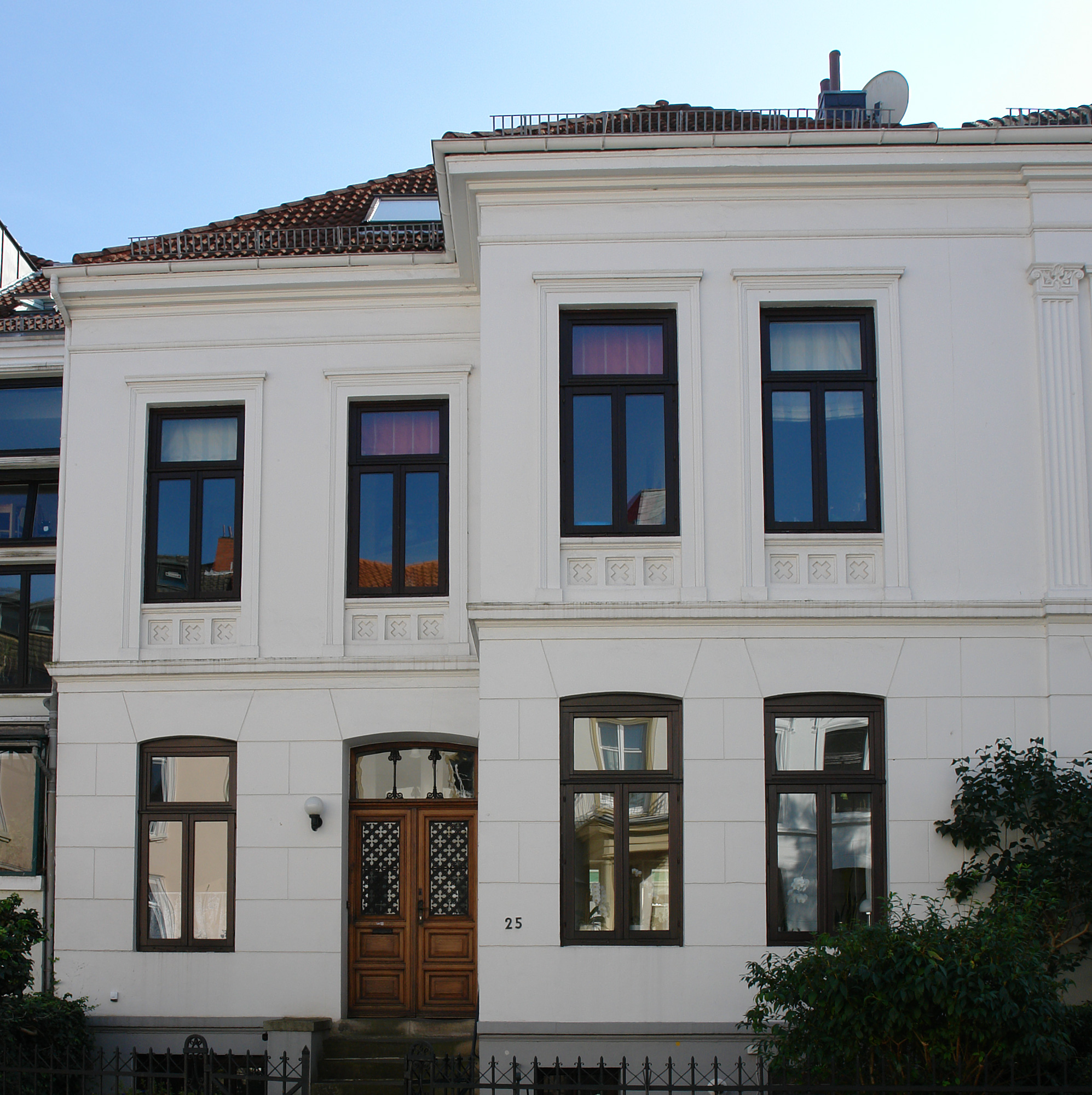 Wohnhaus in Bremen, Rutenstraße 25.Das abgebildete Objekt ist ein geschütztes Kulturdenkmal in der Freien Hansestadt Bremen, mit der Nr. 1091 beim Landesamt für Denkmalpflege registriert.